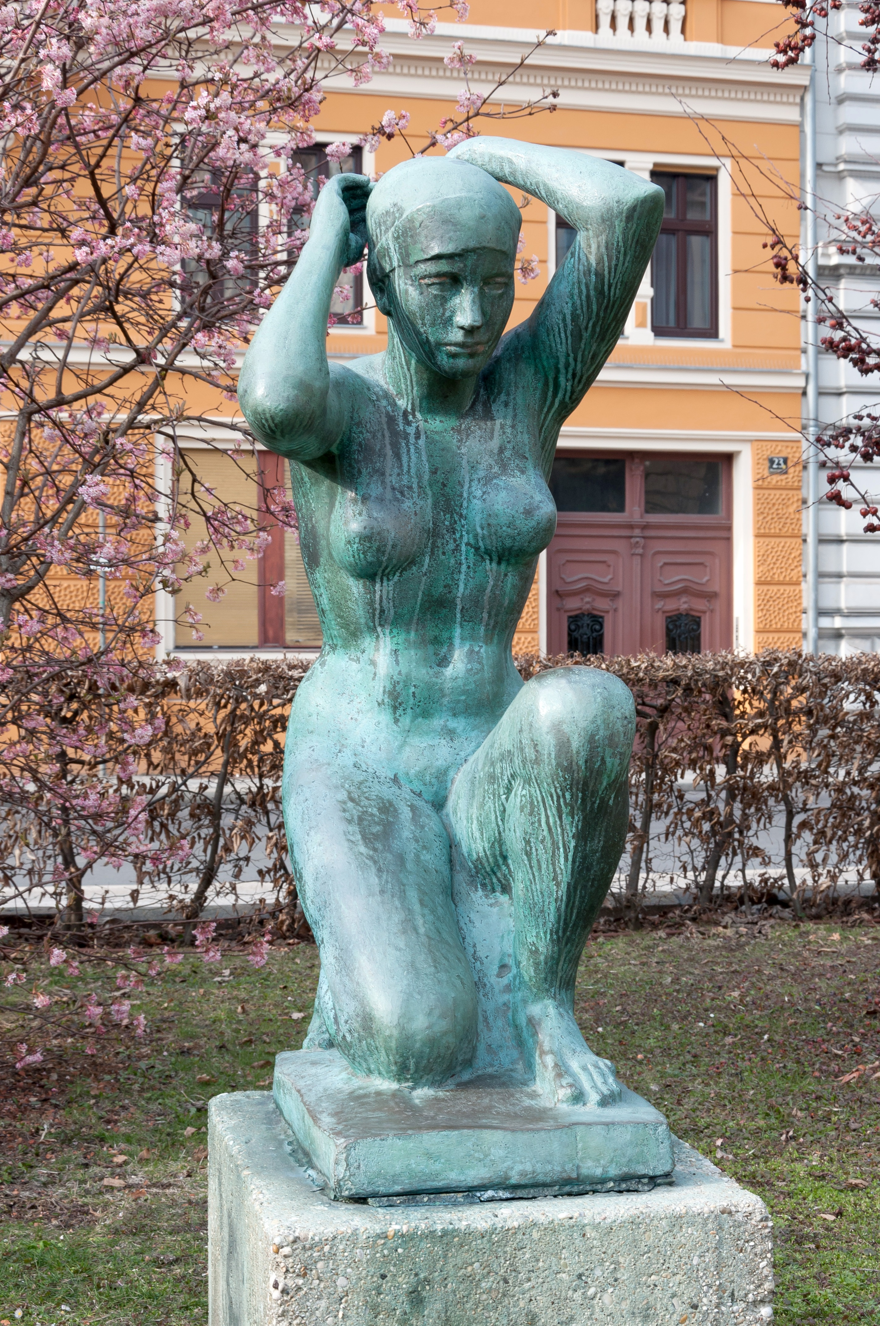 Museumspark: "Kleine Kniende"